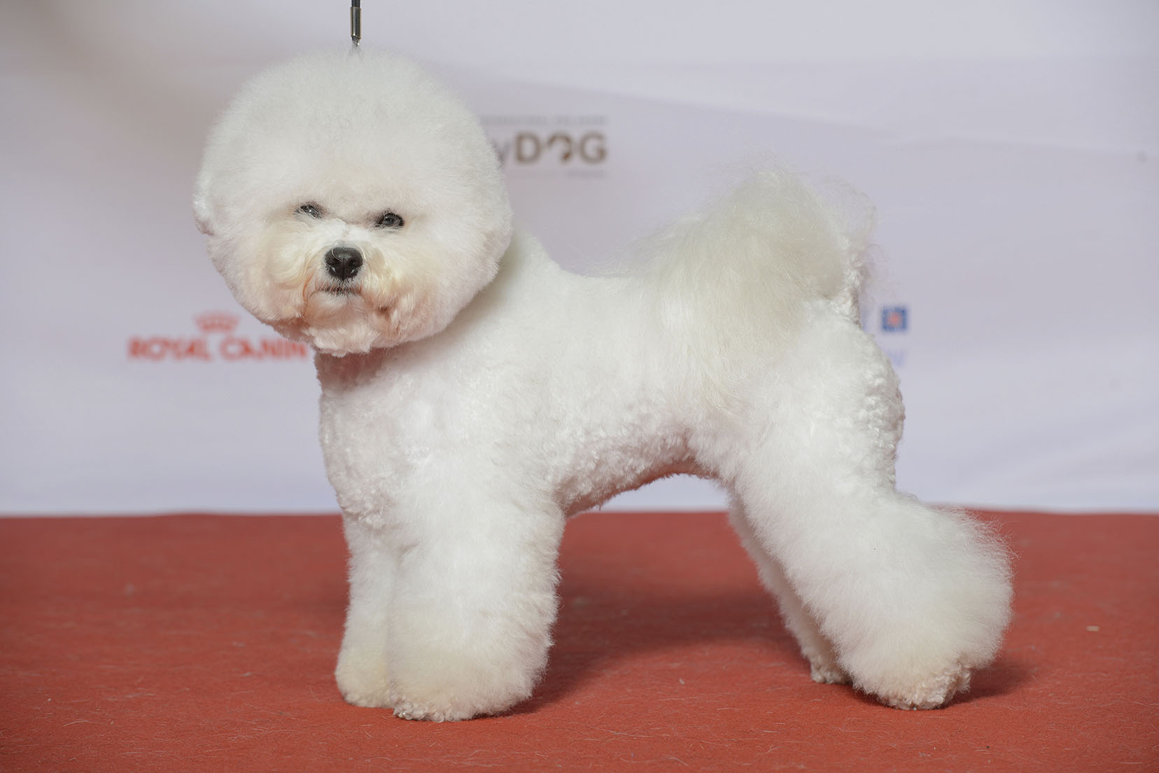 MyDOG, nordens största hundevenemang.